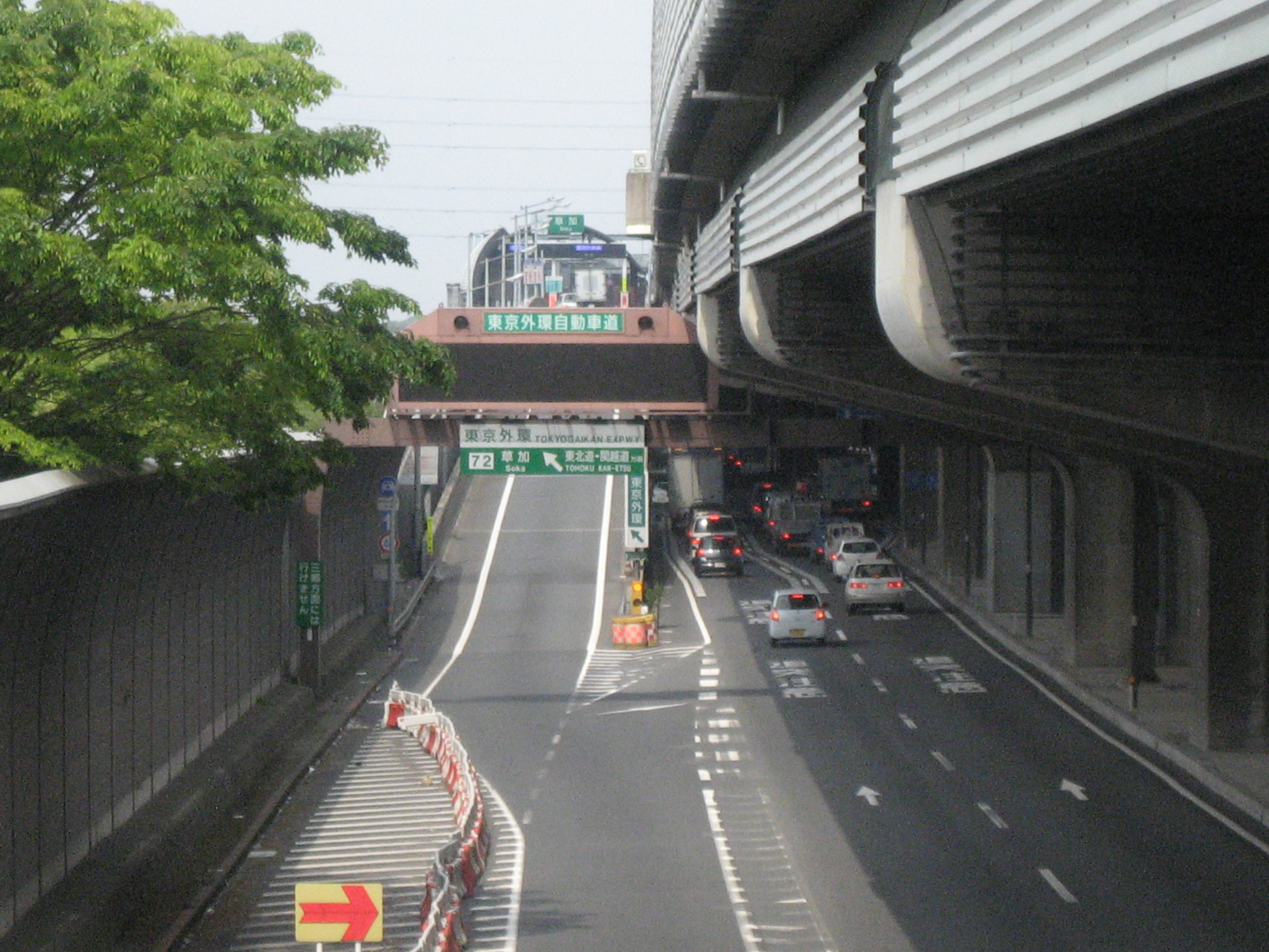 東京外環自動車道草加IC（川口JCT方面側入口付近）